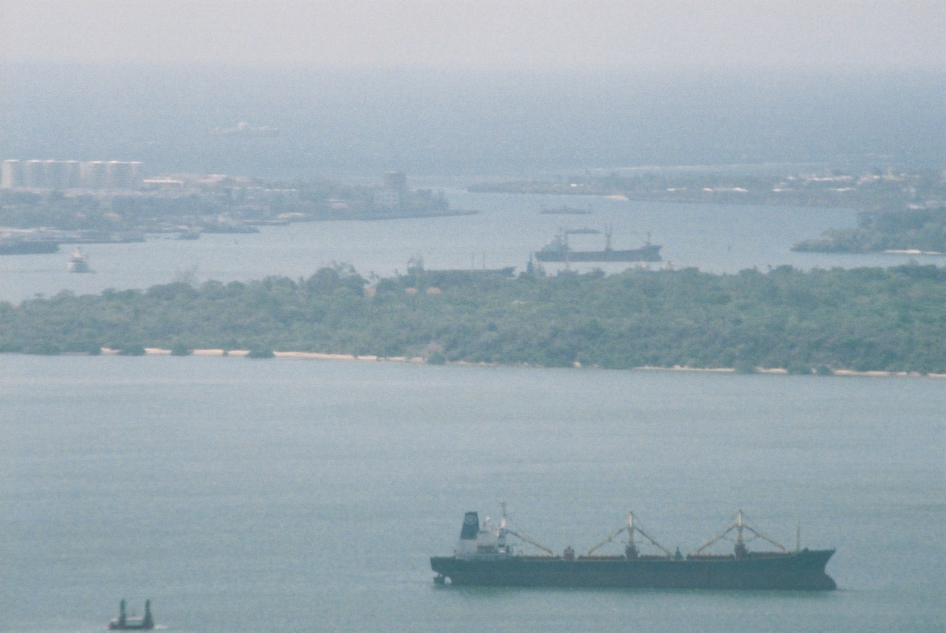 Kilindini Harbour, Mombasa, Kenya